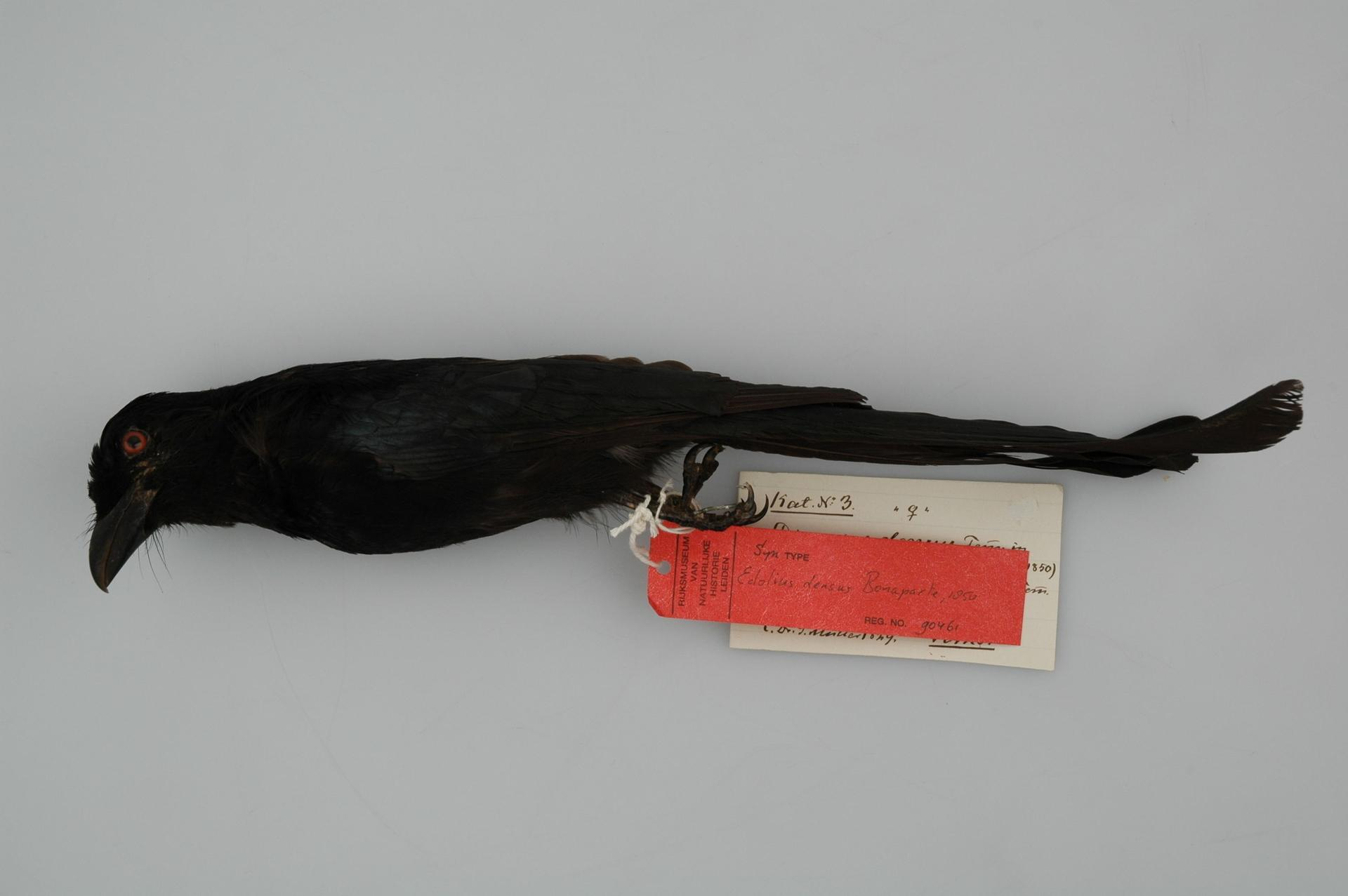 Dicrurus hottentottus densus Bonaparte, 1850